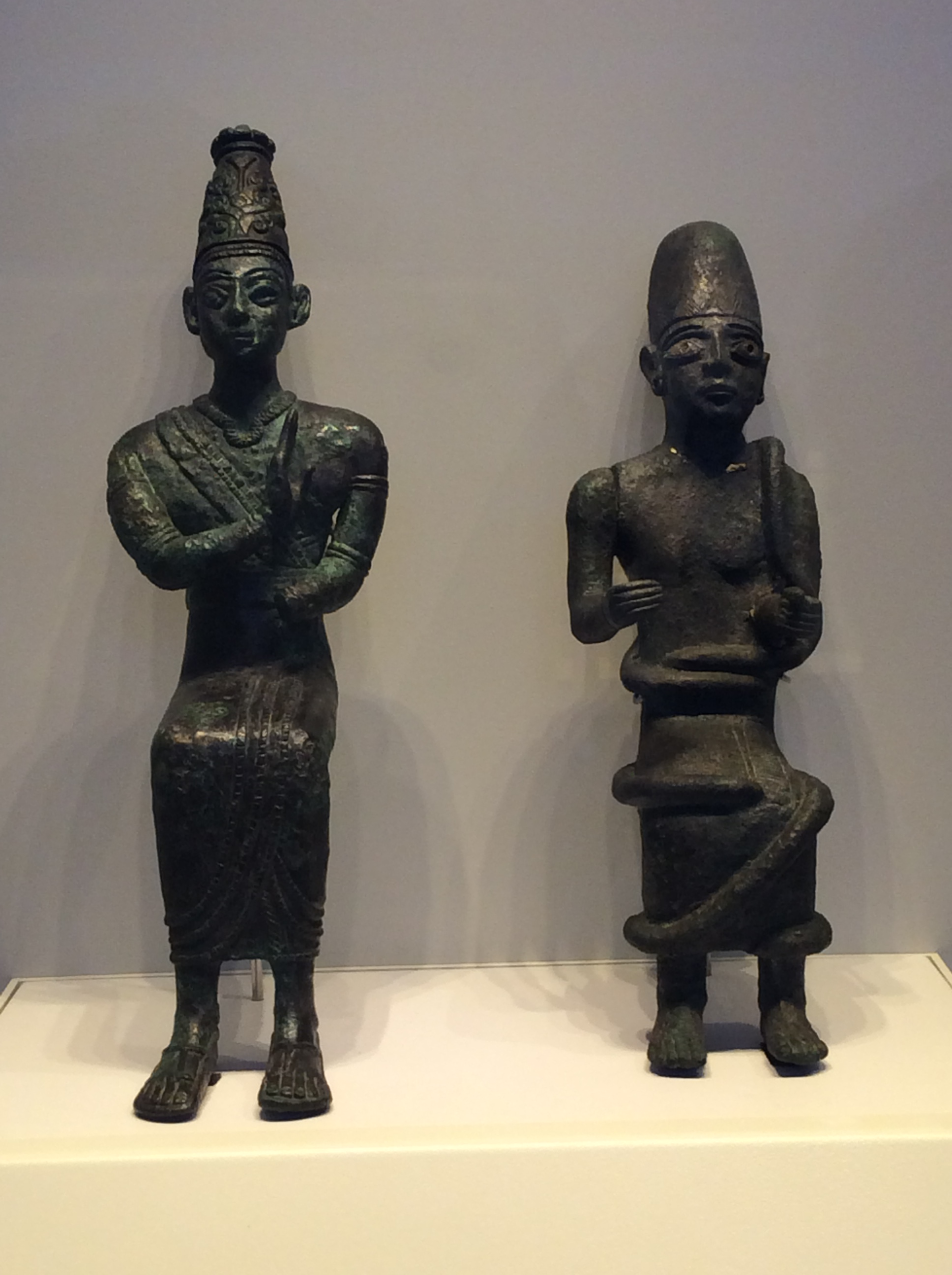 Dieux cananéens 15-13 siècles avant JC trouvé à Hazor, Musée national d'Israël, Jérusalem